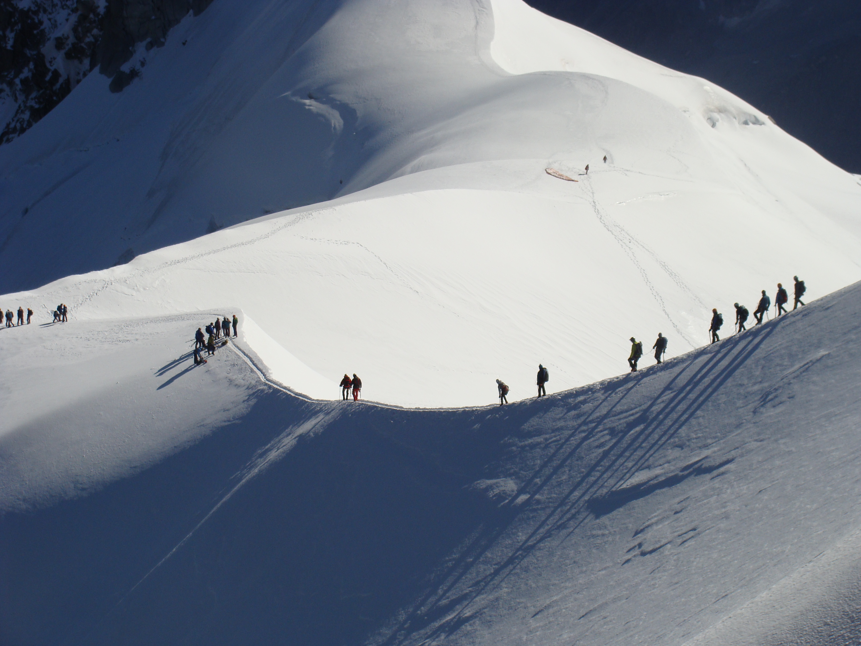 Mountaineers at French Alpes